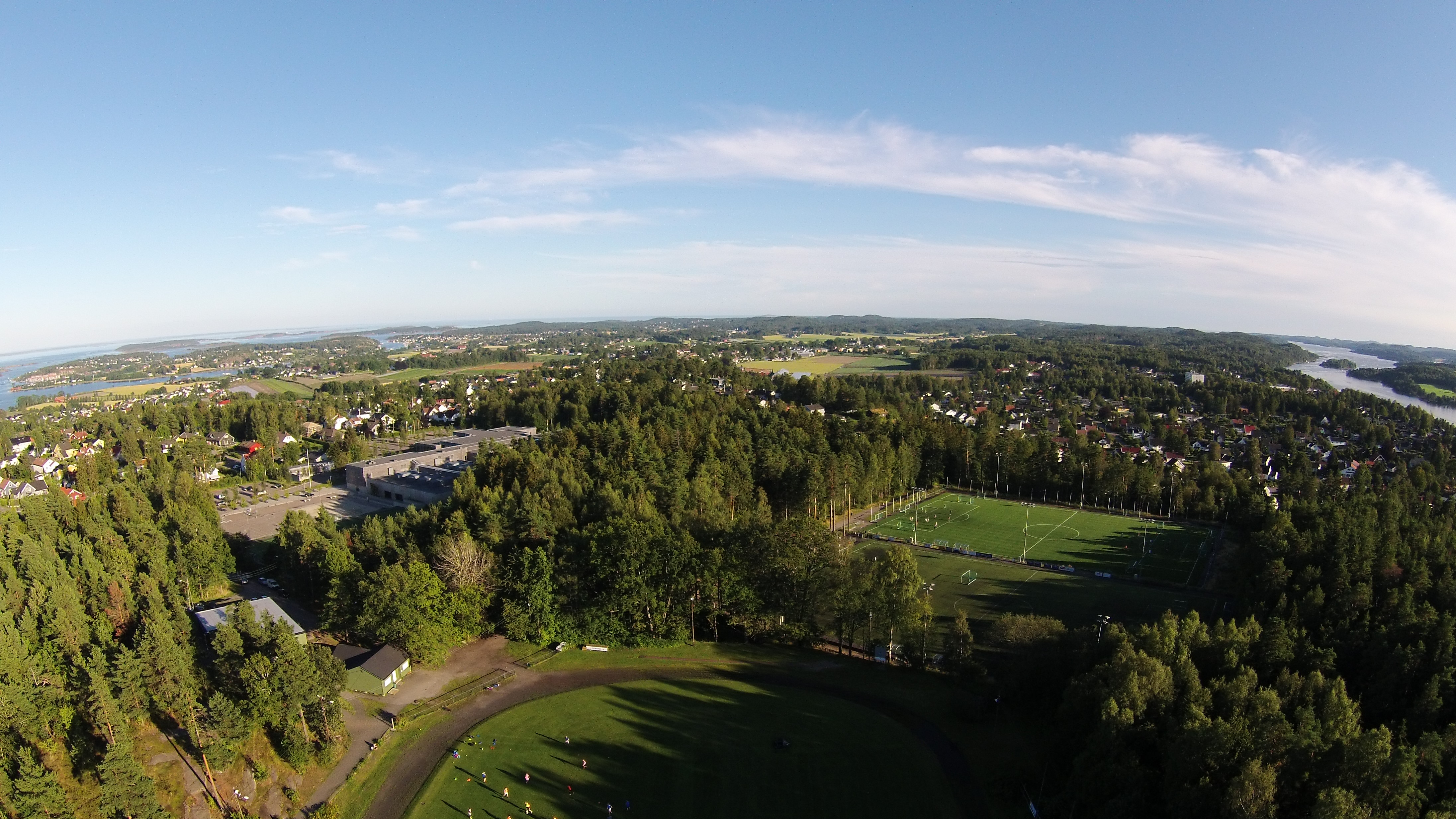 Flyfoto tatt fra nordenden av hovedbanen mot syd